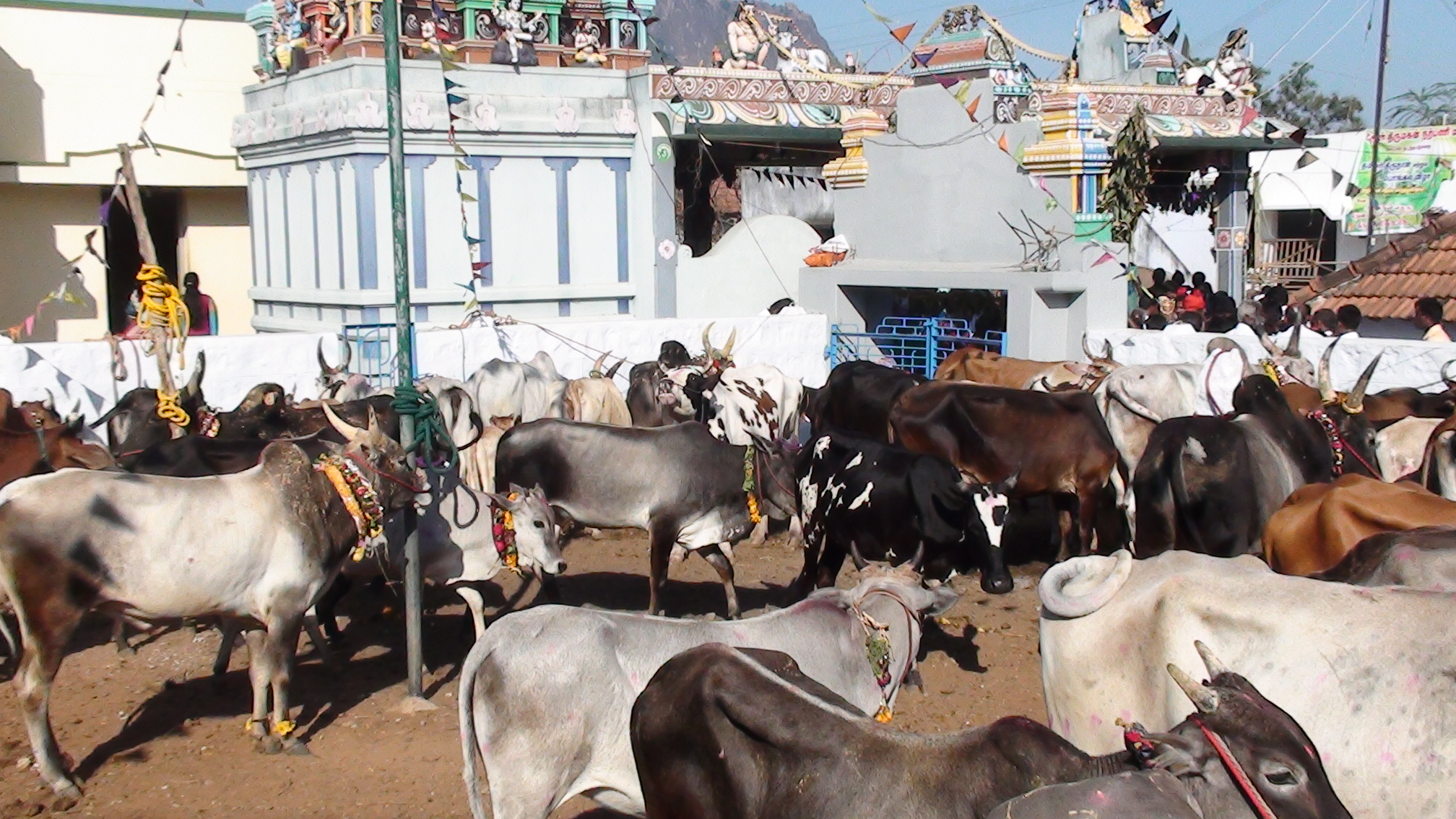 மாட்டுப் பொங்கலன்று தொழுவத்தில் மாடுகள்.